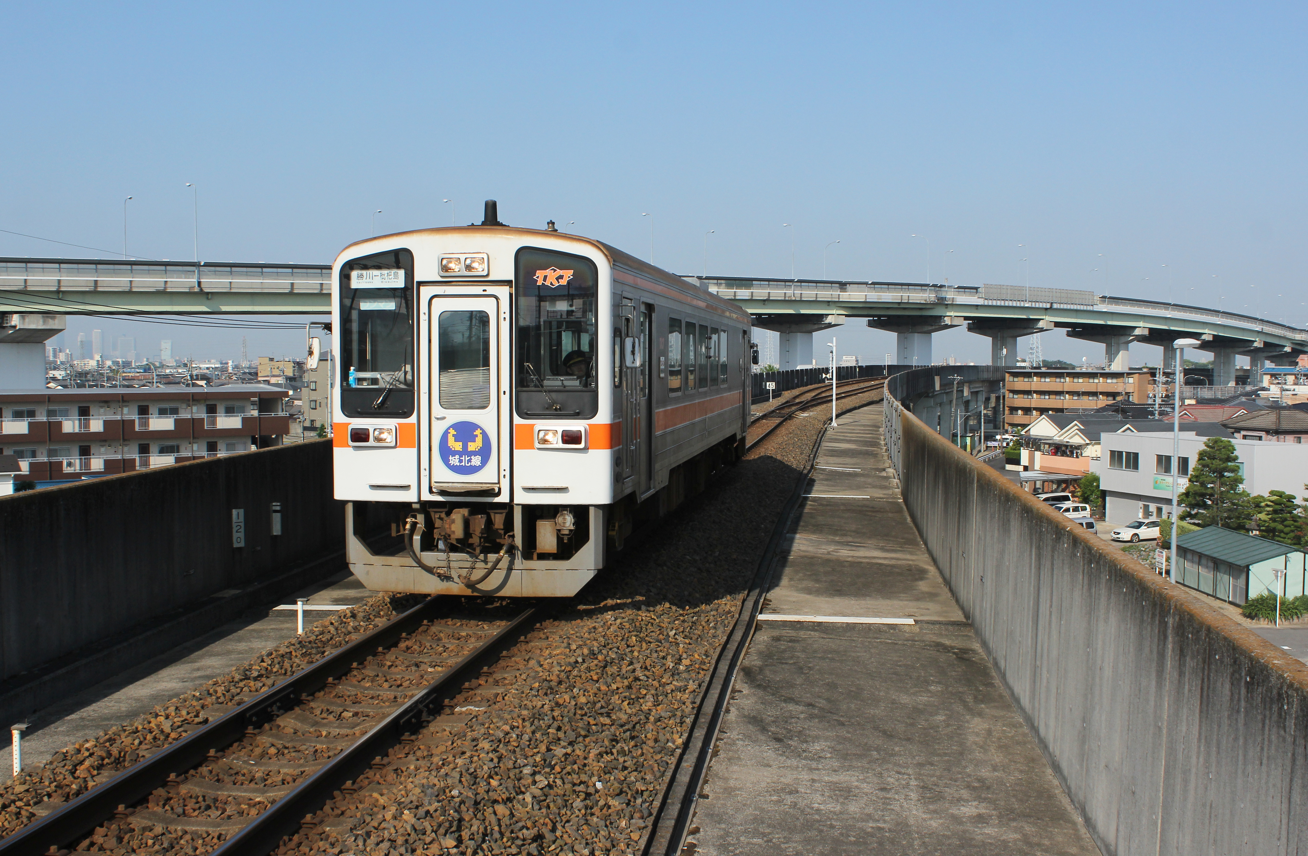 東海交通事業 城北線 勝川駅付近 Canon EOS Kiss X5